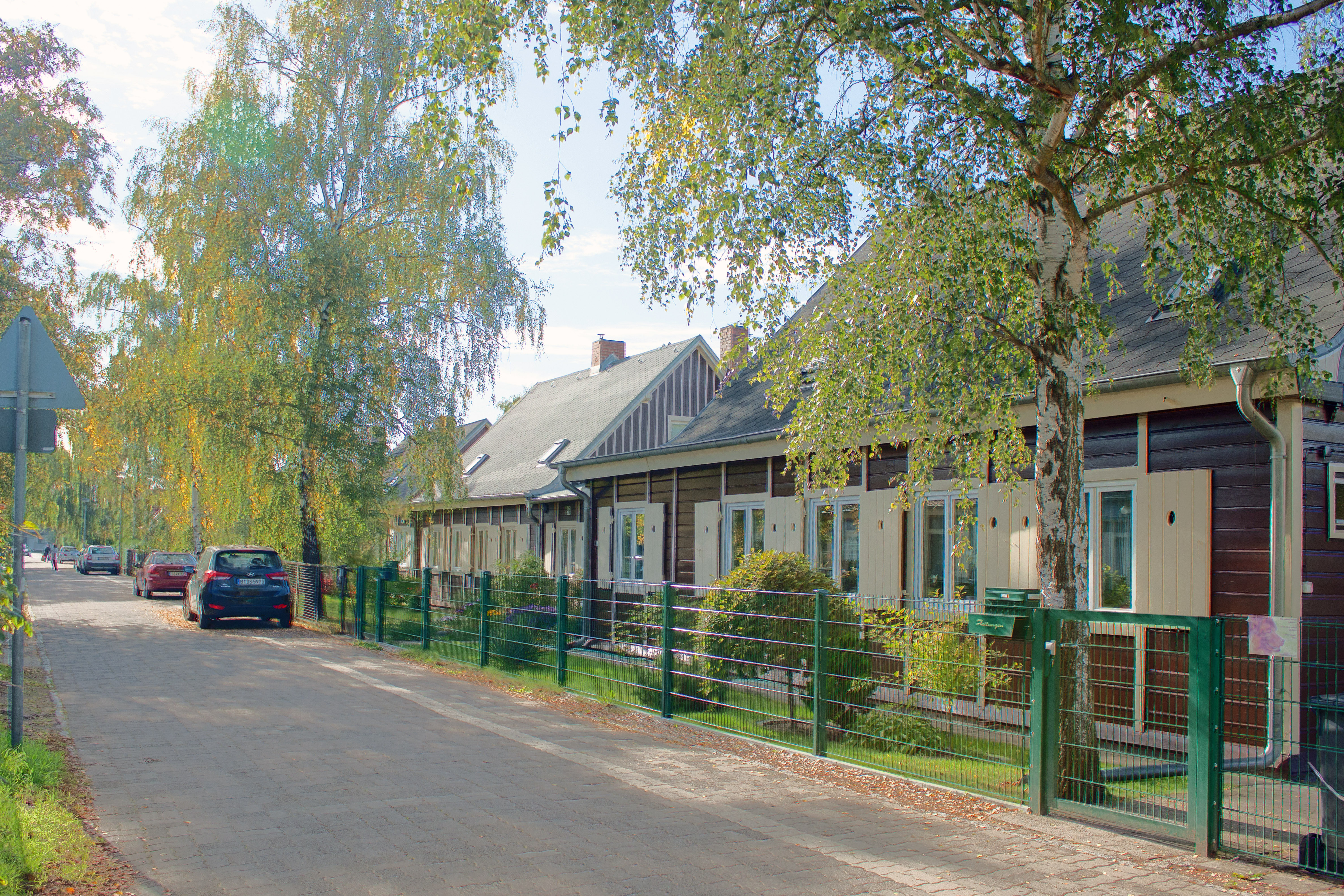 Siedlung Gemeinschaftsstraße I, Gemeinschaftsstraße 13/39, 20/48, Denkmalnummer: 09045274